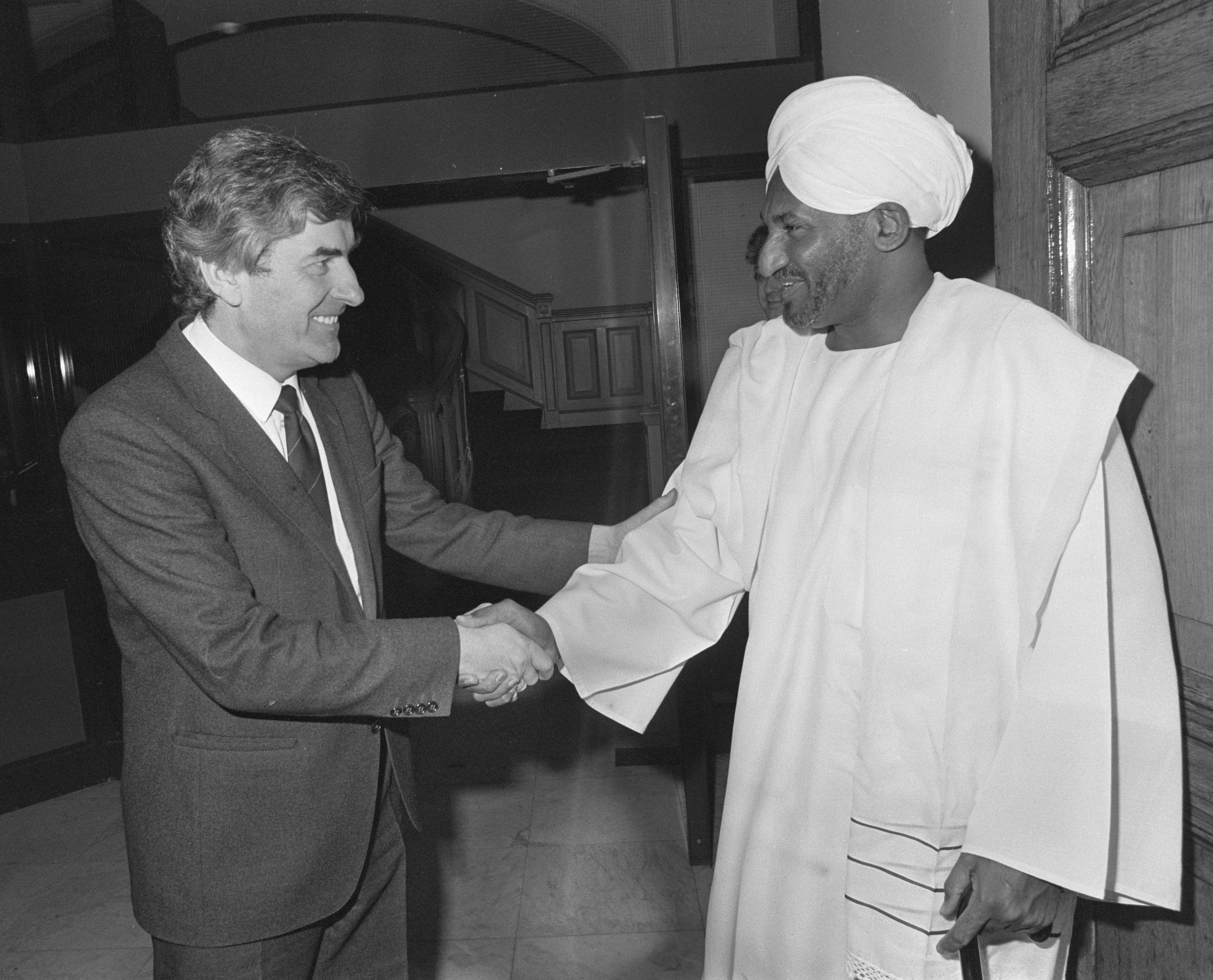 Minister president Sadek el Nahdi van Soedan met premier Lubbers tijdens werkbezoek aan Nederland